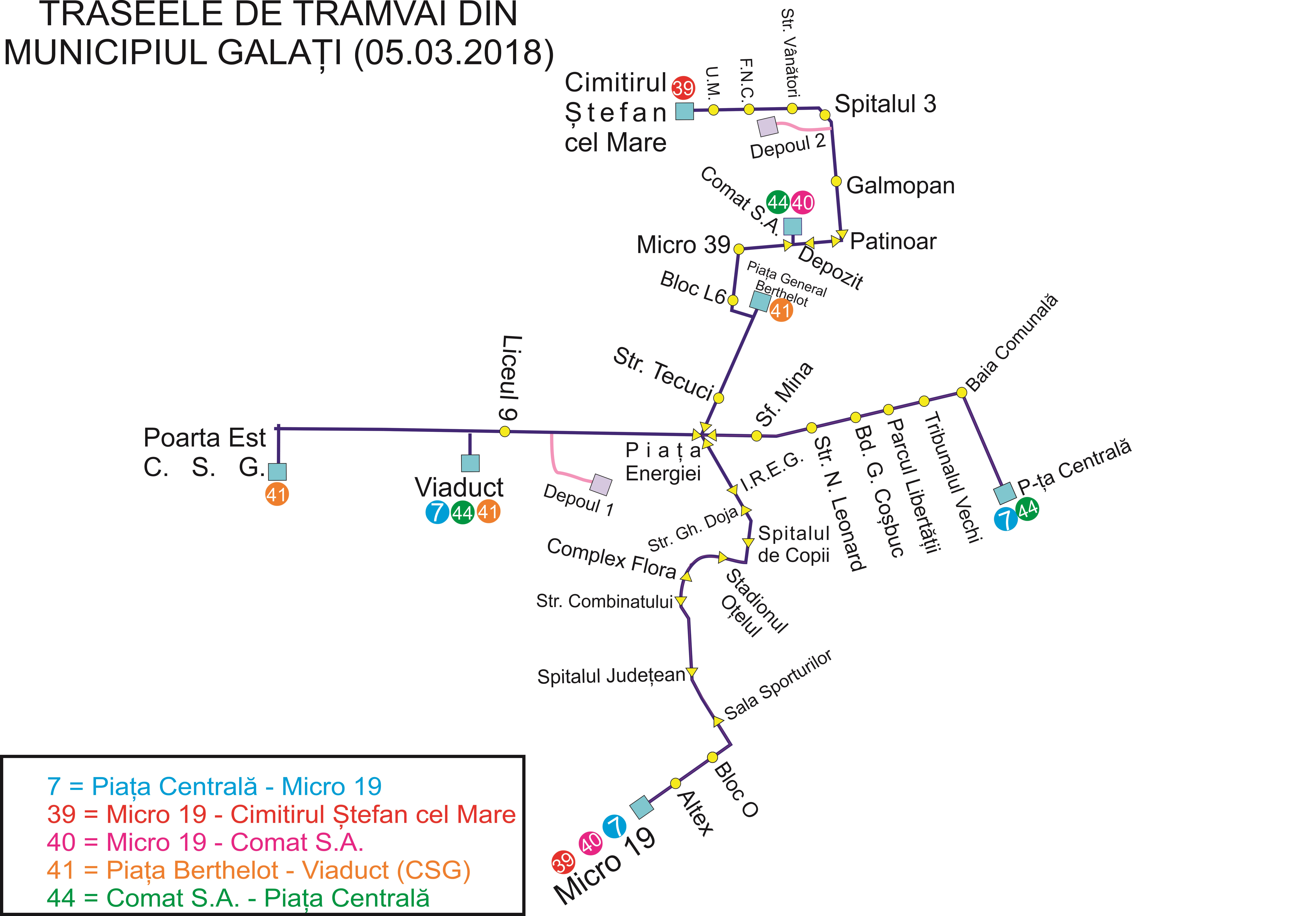 Traseele de tramvai din Galati, din data de 5.3.2018